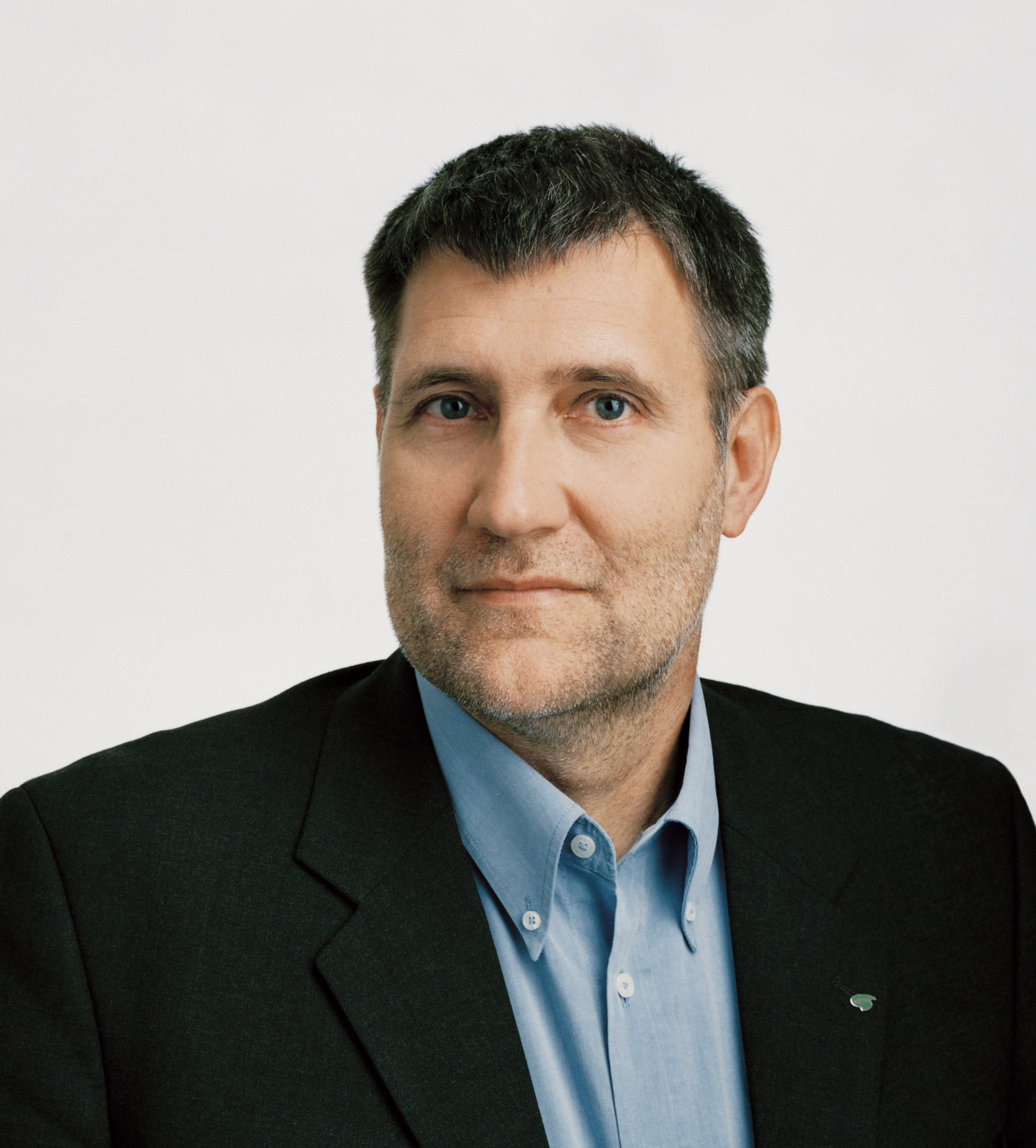 Rüdiger Maresch. Wiener Landtagsabgeordneter und Mitglied des Wiener Gemeinderats (Die Grünen)